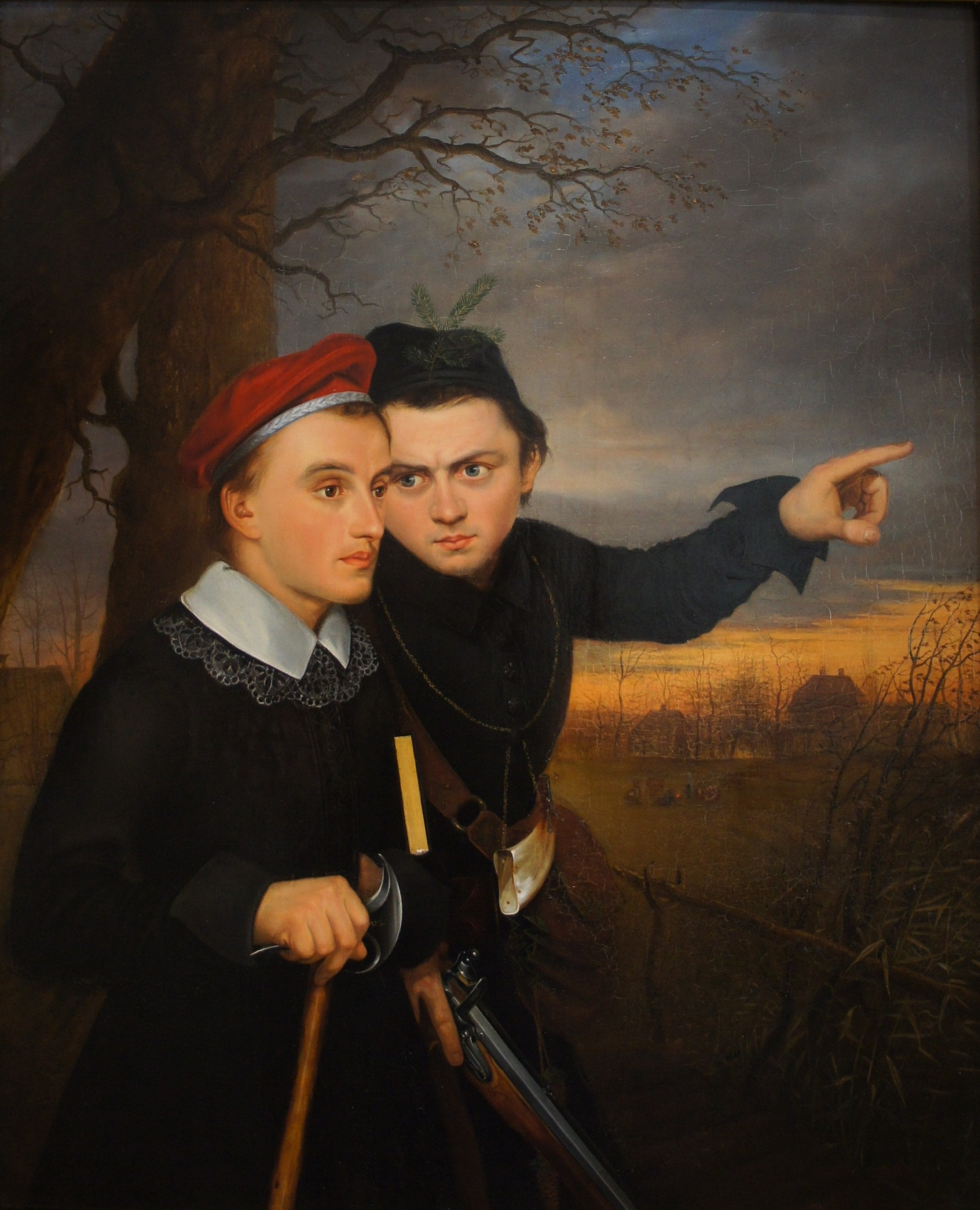 Auf der Jagd. Selbstbildnis des Malers mit seinem Freund Carl Gottlieb Peschel. Öl auf Holz. Gemälde im Kulturhistorischen Museum, Neißstraße 30 in Görlitz